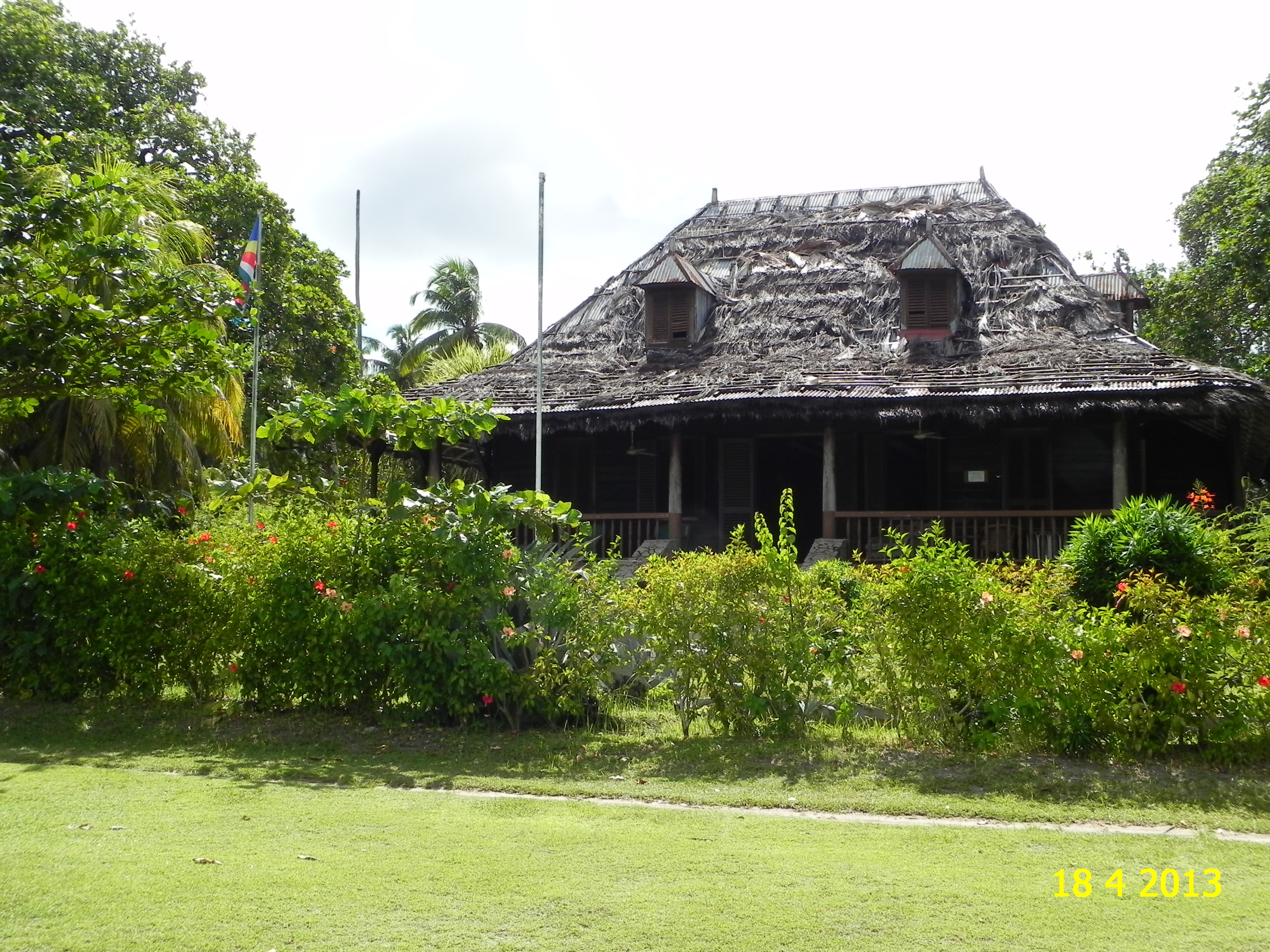 HOUSE OF EMMANUELLE'S MOVIE AT ANSE SOURCE D'ARGENT, APRIL 2013 (Grann Kaz)